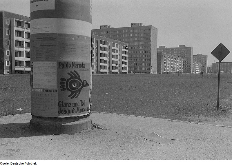 Original image description from the Deutsche Fotothek Dresden-Johannstadt. Wohnkomplex Johannstadt-Nord